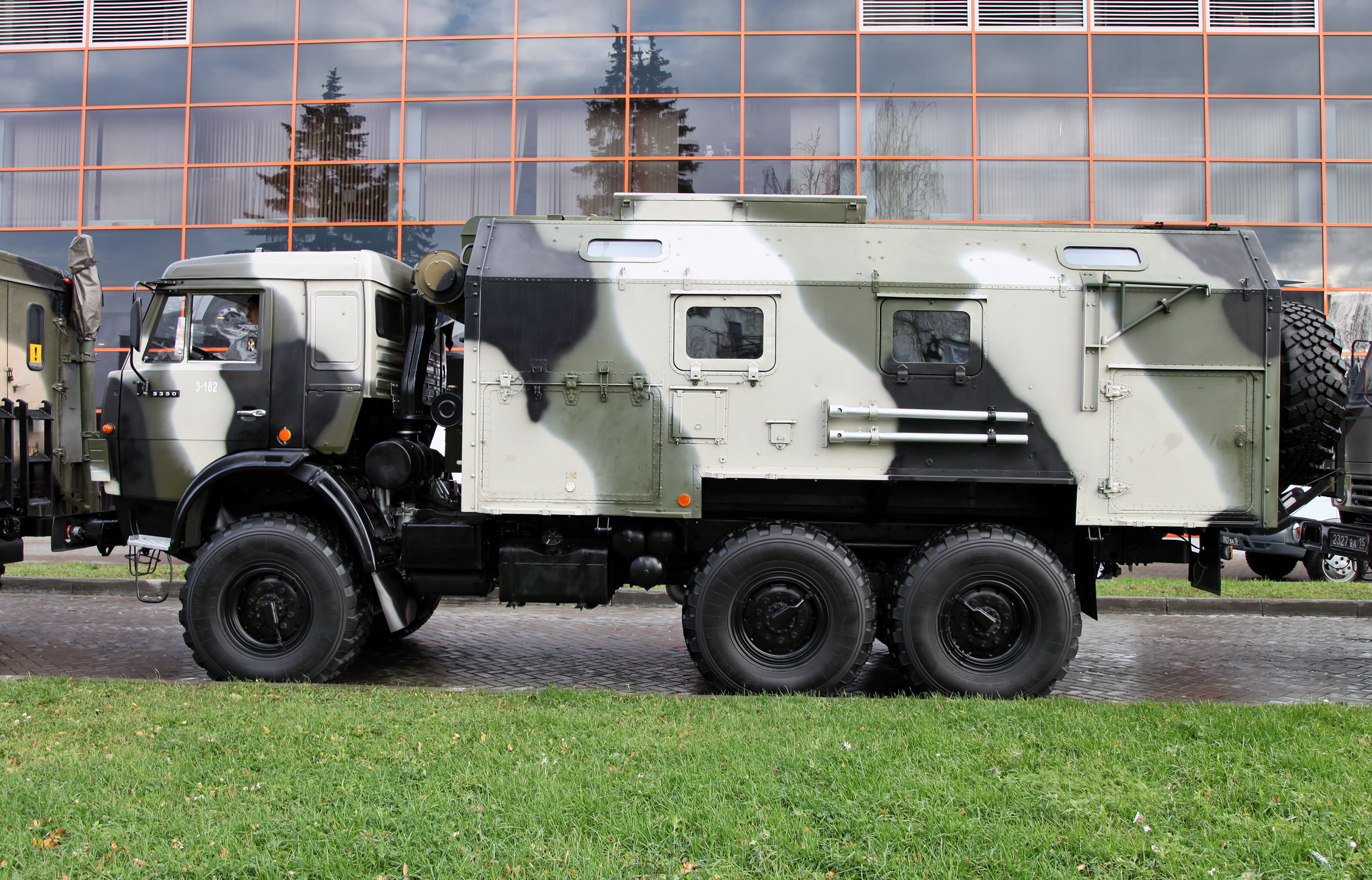 Мастерская по ремонту средств связи Малолеток-МС (Communication devices maintenance vehicle Maloletok-MS)